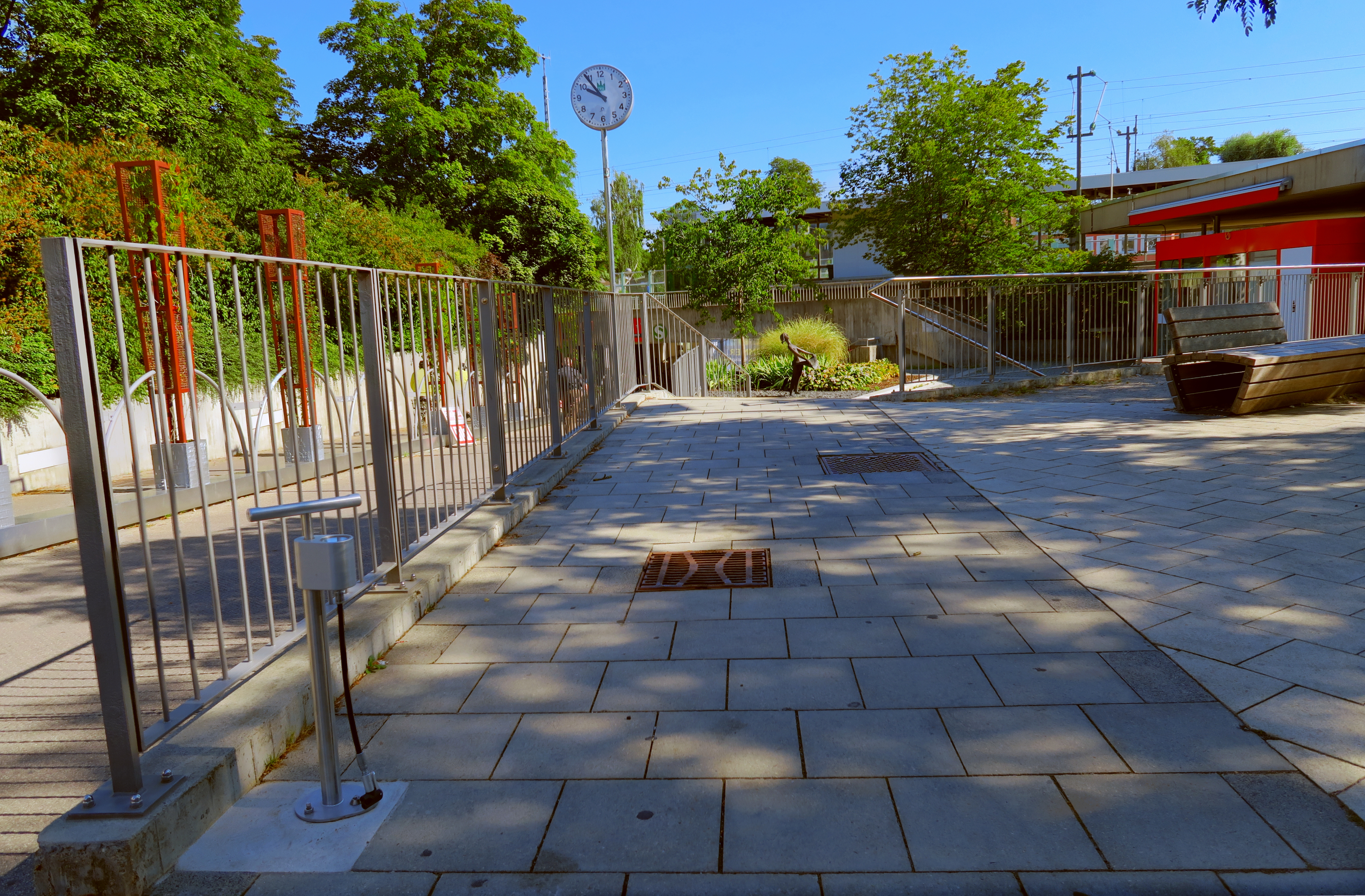 Deutschland, Bayern, Oberbayern, Landkreis Fürstenfeldbruck, Gemeinde Gröbenzell, südlicher Zugang zur S-Bahn Station mit stationärer Fahrradluftpumpe